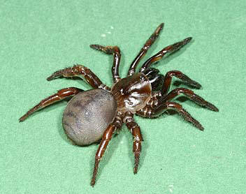 female Latouchia swinhoei kume from Okinawa.